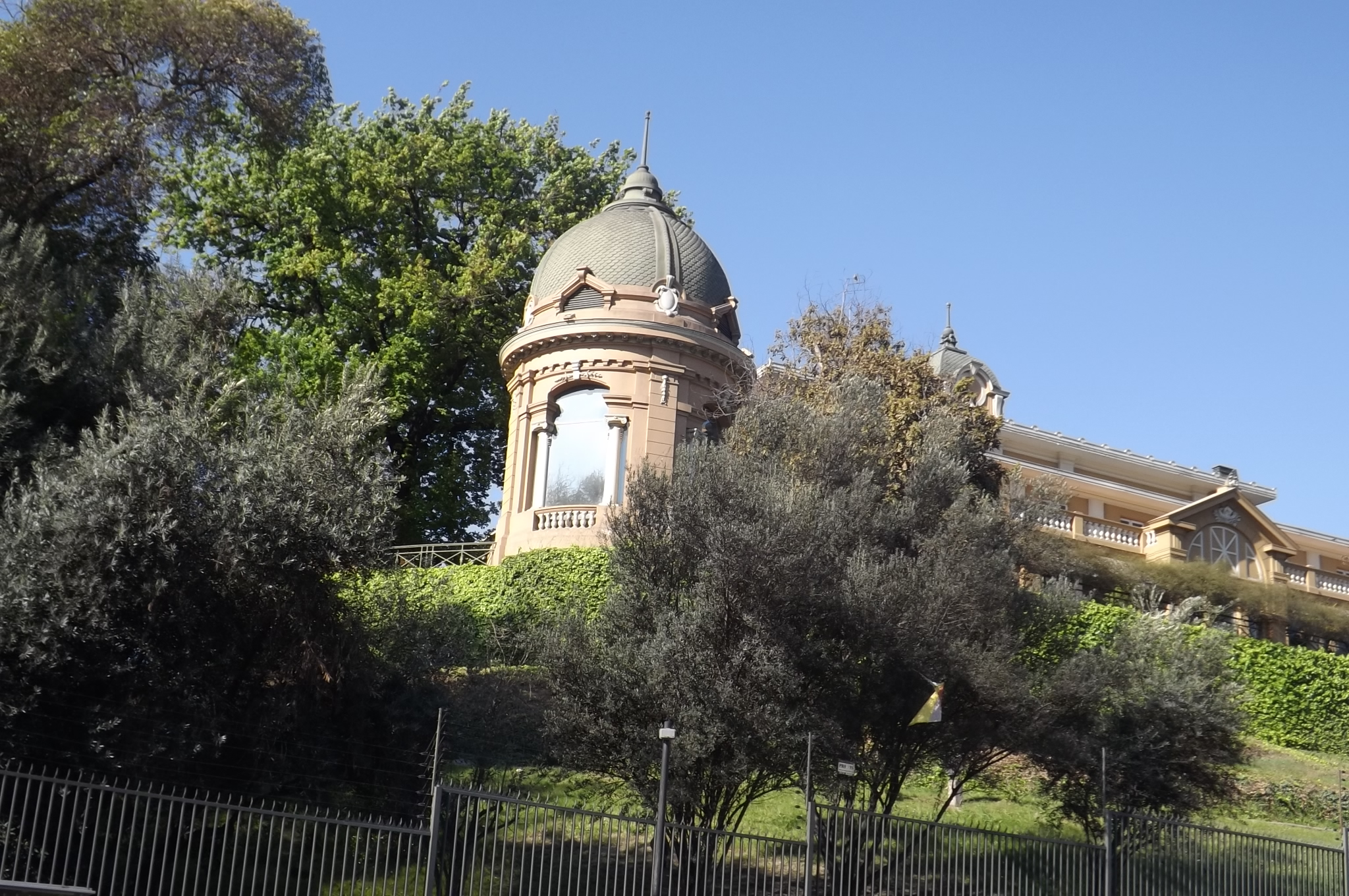 Palacio Riesco This is a photo of a national monument in Chile: 1267